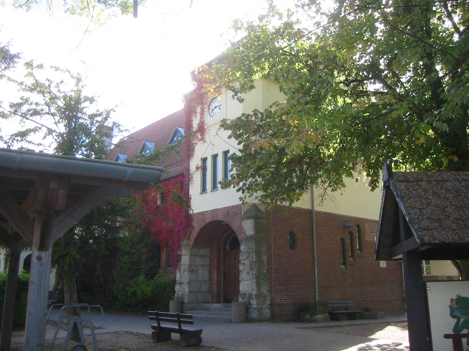 Denkmalgeschützte Schule in Ruhlsdorf (Teltow) in Brandenburg